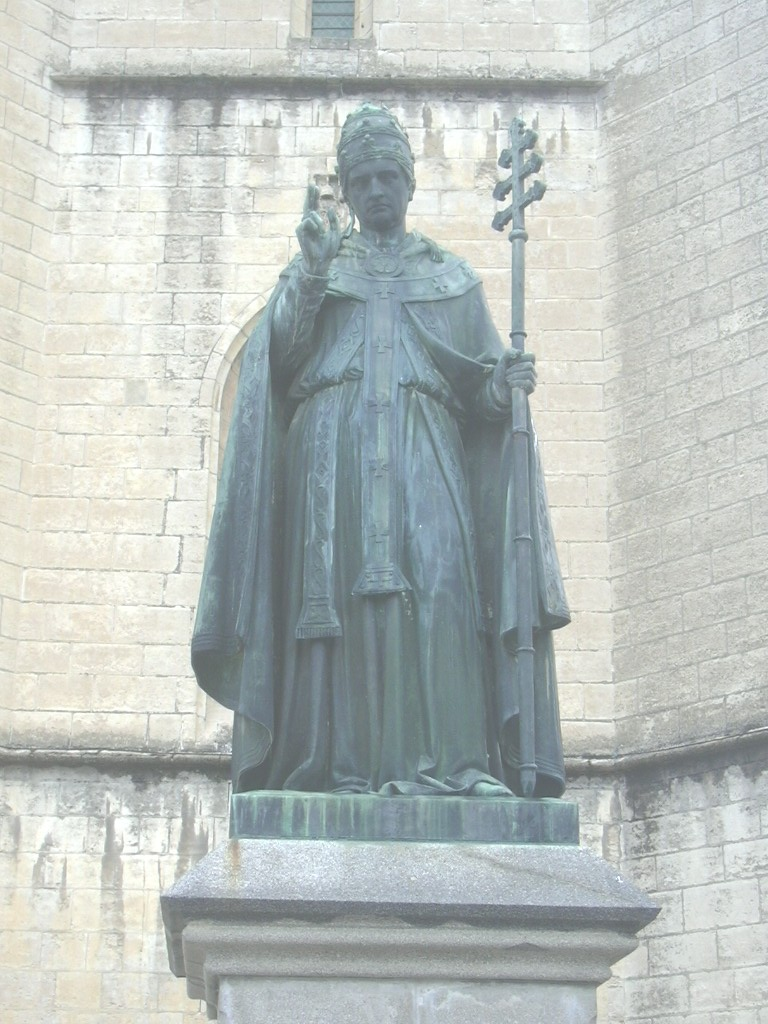 Statue du pape Urbain V devant la cathédrale de Mende.Plaque : Au bienheureux Urbain V pape de 1362 à 1370, bienfaiteur du Gévaudan - 28 juin 1874 Elle a été prise par User:Odejea le 29 juillet 2005